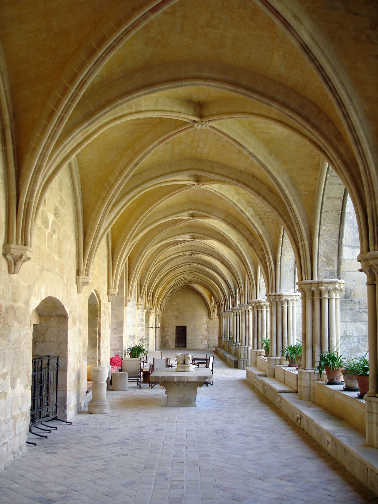 La galerie ouest du cloître de l'abbaye de Royaumont, Val-d'Oise, France.